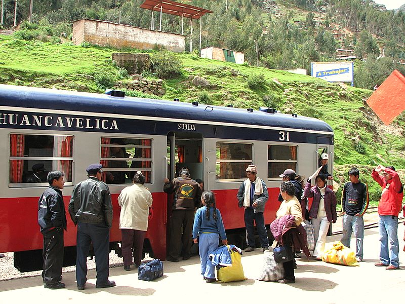 El Coche Motor que une las dos ciudades; también hay trenes tradicionales. Licensing